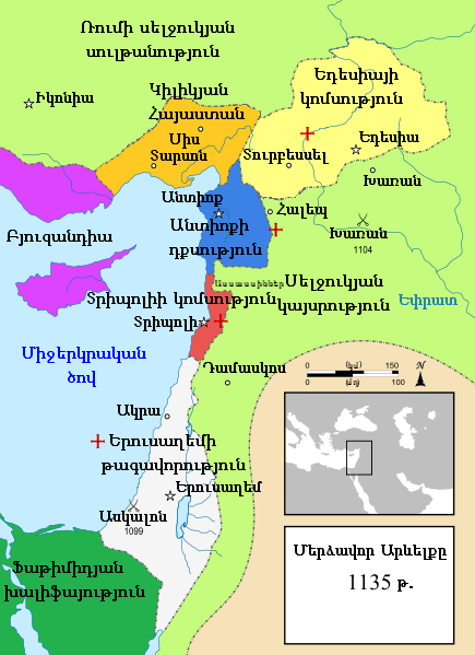 Մերձավոր Արևելքը 1135 թ-ին